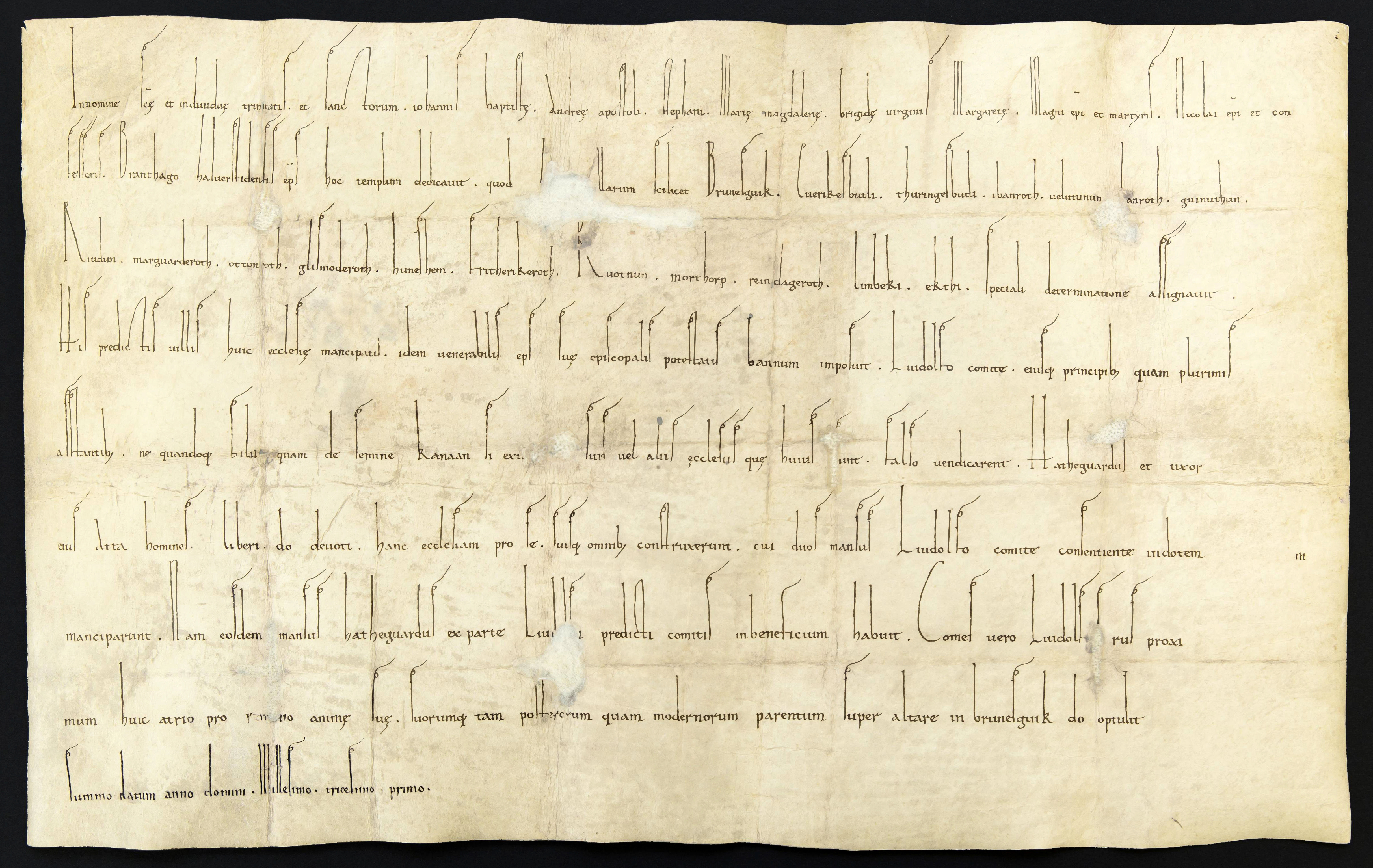 Braunschweig: Weiheurkunde der Magnikirche aus dem Jahre 1031. Stadtarchiv Braunschweig, Signatur: A III 7: 1. Transcript: Innomine s(an)c(t)æ et individuæ trinitatis. et sanctorum iohannis batistæ. andreæ apostoli. stephani. Mariæ magdalenæ. brigidæ virgins Margaretæ. Magni ep(iscop)i et martyris. Nicolai ep(iscop)i et con- sessoris. Branthago halverstidensis ep(iscopu)s hoc templum dedicavit, quod (barum vil)larum scilicet Brunesguik. Everikesbutli. thuringesbutli. ibanroth. velittunun.(h)anroth. guinuthun. Riudun. marguarderoth. otton(r)oth. glismoderoth. huneshem. fritherikeroth. Ruotnun. morthorp. reindageroth. limbeki. ekthi. speciali determinatione assignavit. His predictis villis huic ecclesiæ mancipati(s). idem venerabilis eps suæ episcopalis potestatis bannum imposuit. Liudolfo comite eiusq(ue) principib(us) quam plurimis asstantib(us), ne quandoq(ue) fil(ii) (ne)quam de semine kanaan si ex(surgerent.) suis vel aliis ecclesiis, quæ huius (s)unt, falso vendicarent. Hatheguardu(s) et uxor eius Atta homines. liberi. d(omin)o devoti. hanc ecclesiam pro se suisq(ue) omnib(us) construxerunt. cui duos mansus Liudolfo comite consentiente indotem manciparunt. Nam eosdem mansus hatheguardus ex parte Liu(dolfi) predicti comitis inbeneficium habuit. Comes vero Liudolf(us) rus proxi(-) mum huic atrio pro (remedi)o animæ suæ. suorumq(ue) tam po(steror)um quam modernorum parentum super altare in brunesguik d(omin)o optulit summo datum anno domini. millesimo tricesimo primo.